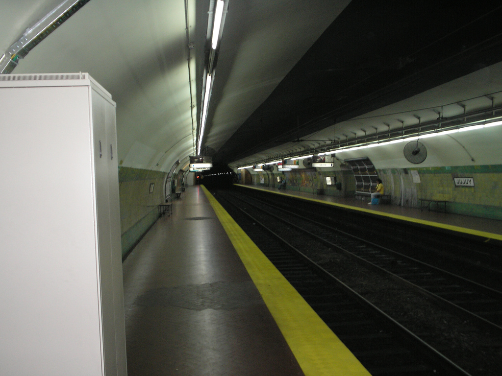 Estación Jujuy de la línea E de la red de subterráneos de la Ciudad de Buenos Aires